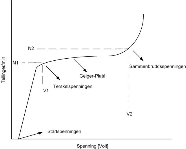 Den typiske karakteristikken til et Geiger-Müller-rør